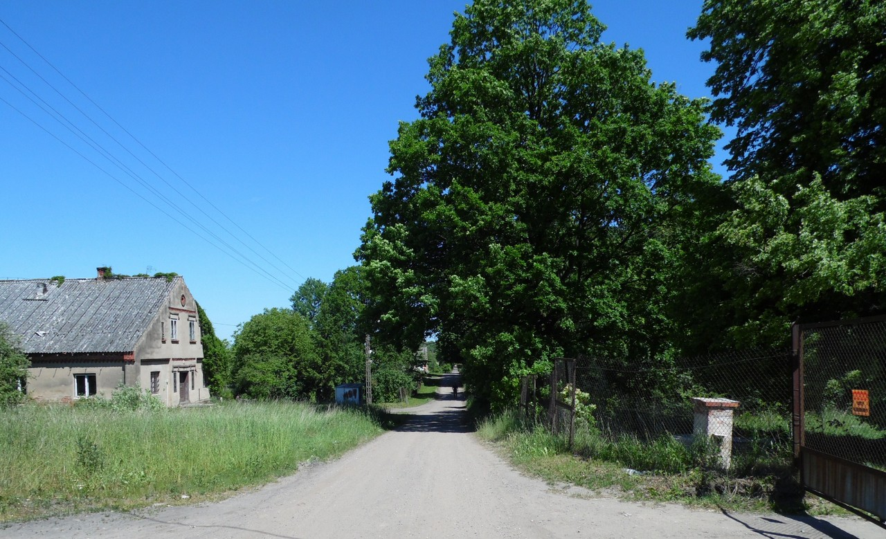 WIDOK NA KAŁKI OD STRONY ŁĘKNICY.